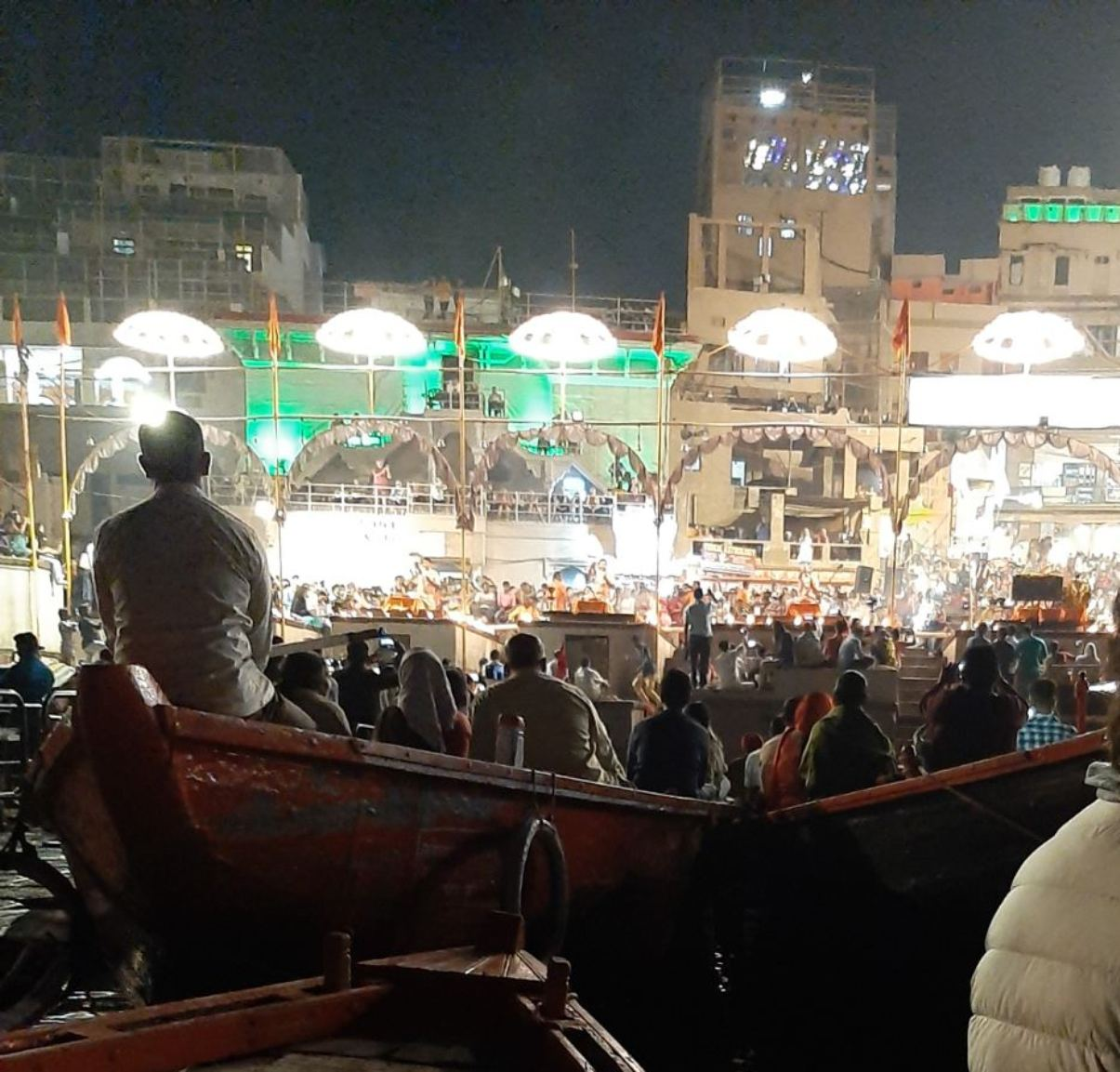 Pilgrims in boats during a religious holiday on the Ganges River. Varanasi.